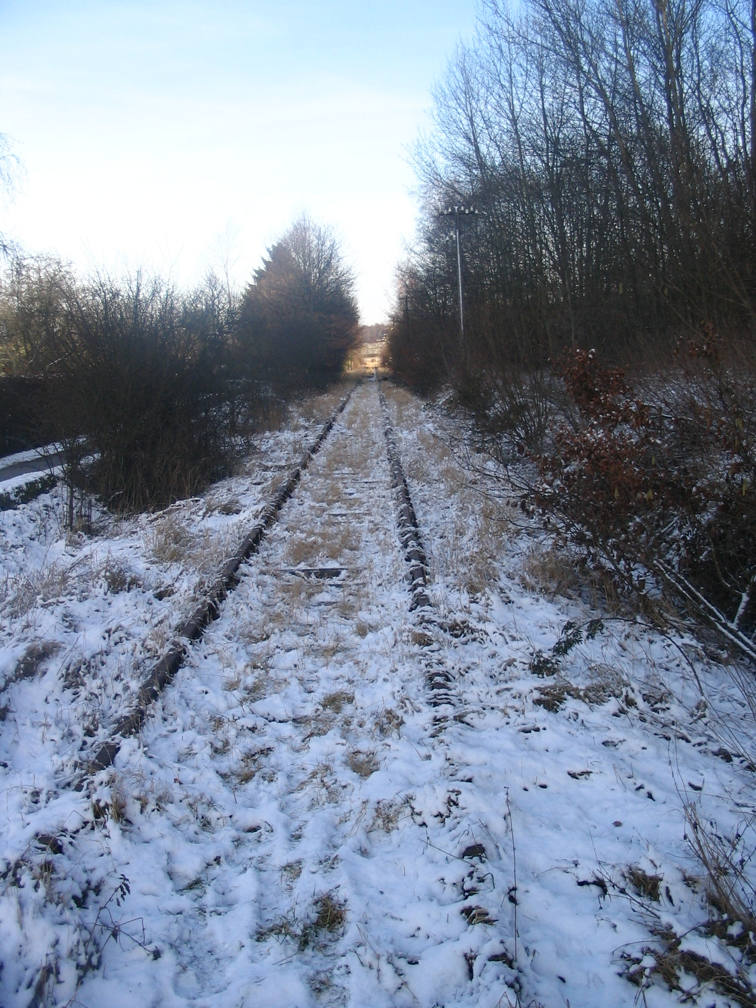 stillgelegte Hunsrückquerbahn bei Ellern